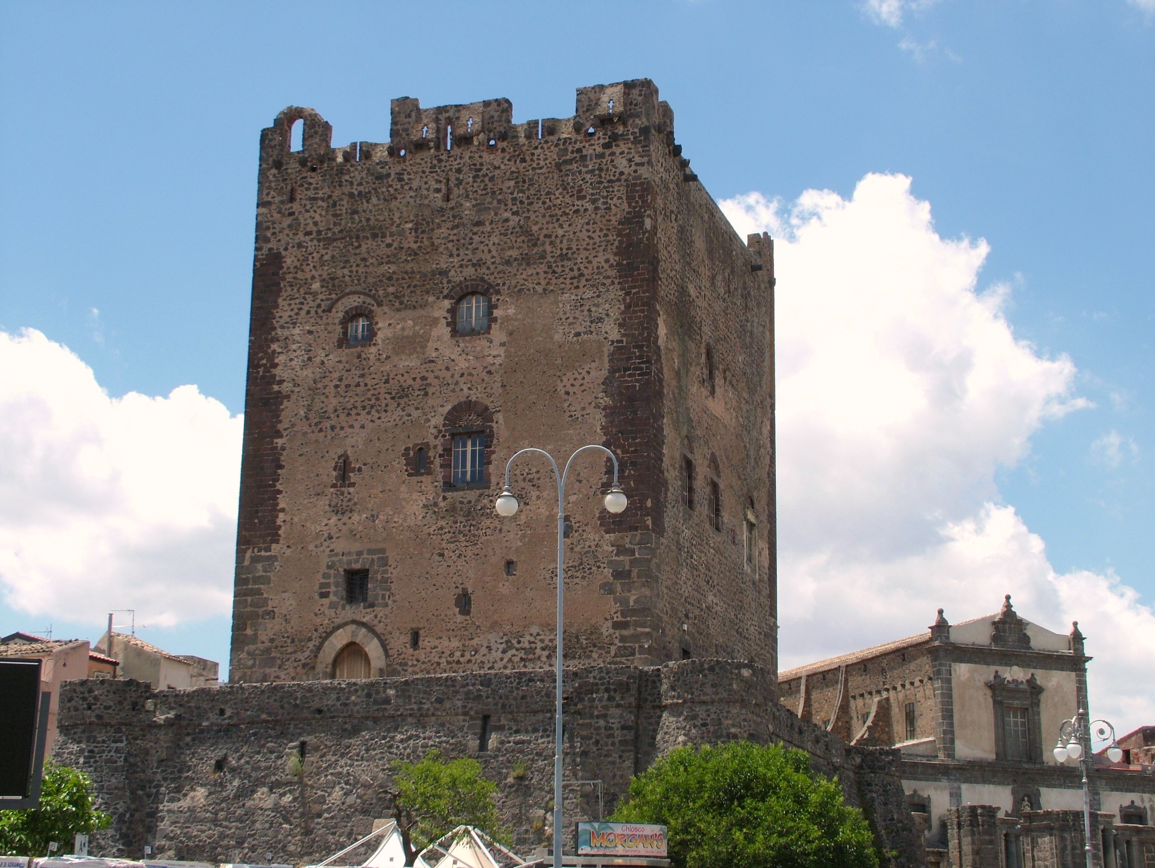 Adrano, Sizilien, das normannische Hotel